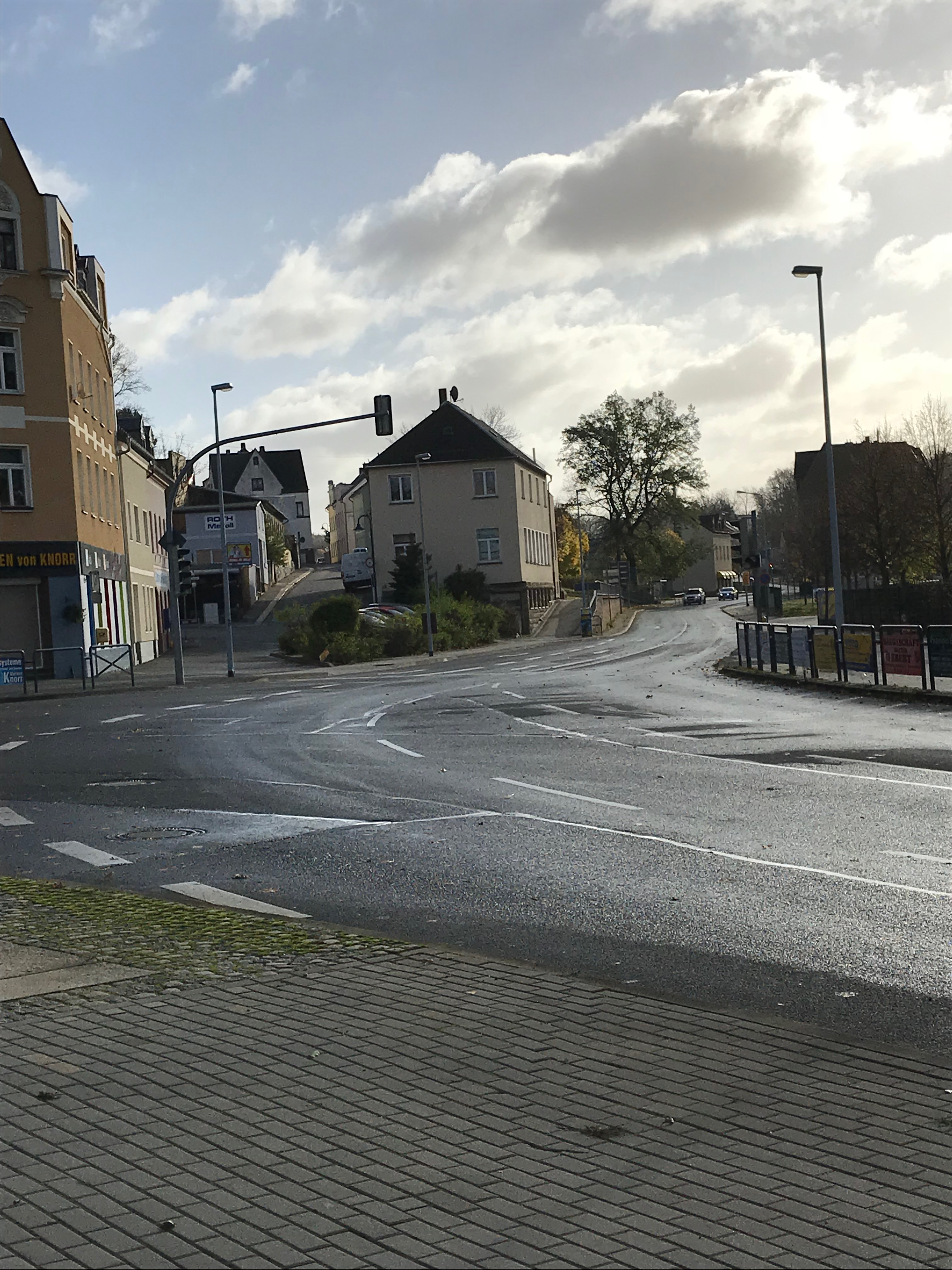 ehemaliger Haltepunkt Reichenbach( Vogtl) Altstadt